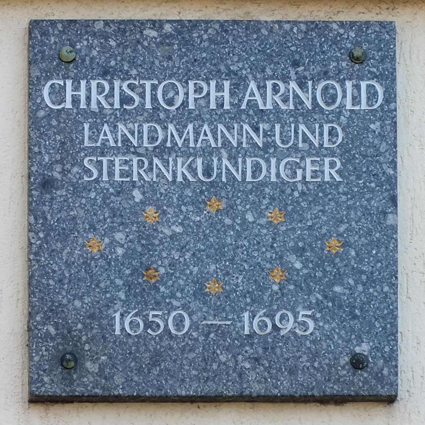 Gedenktafel für den Bauern-Astronomen Chistoph Arnold (1650-1695) an seinem Geburts- und Wohnhaus in Leipzig-Sommerfeld.